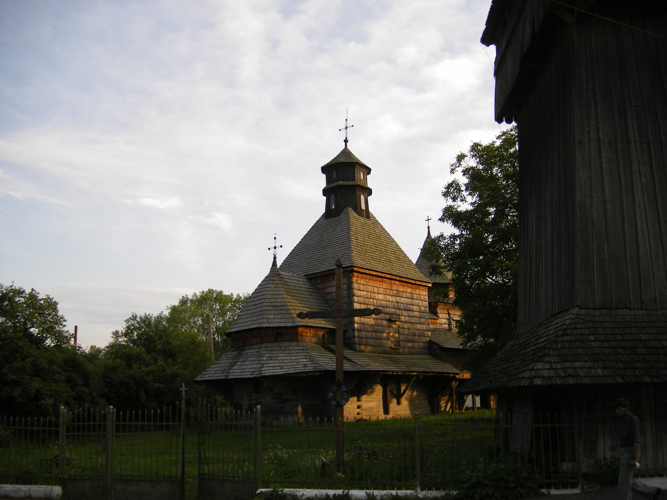 Wooden church in Drohobych